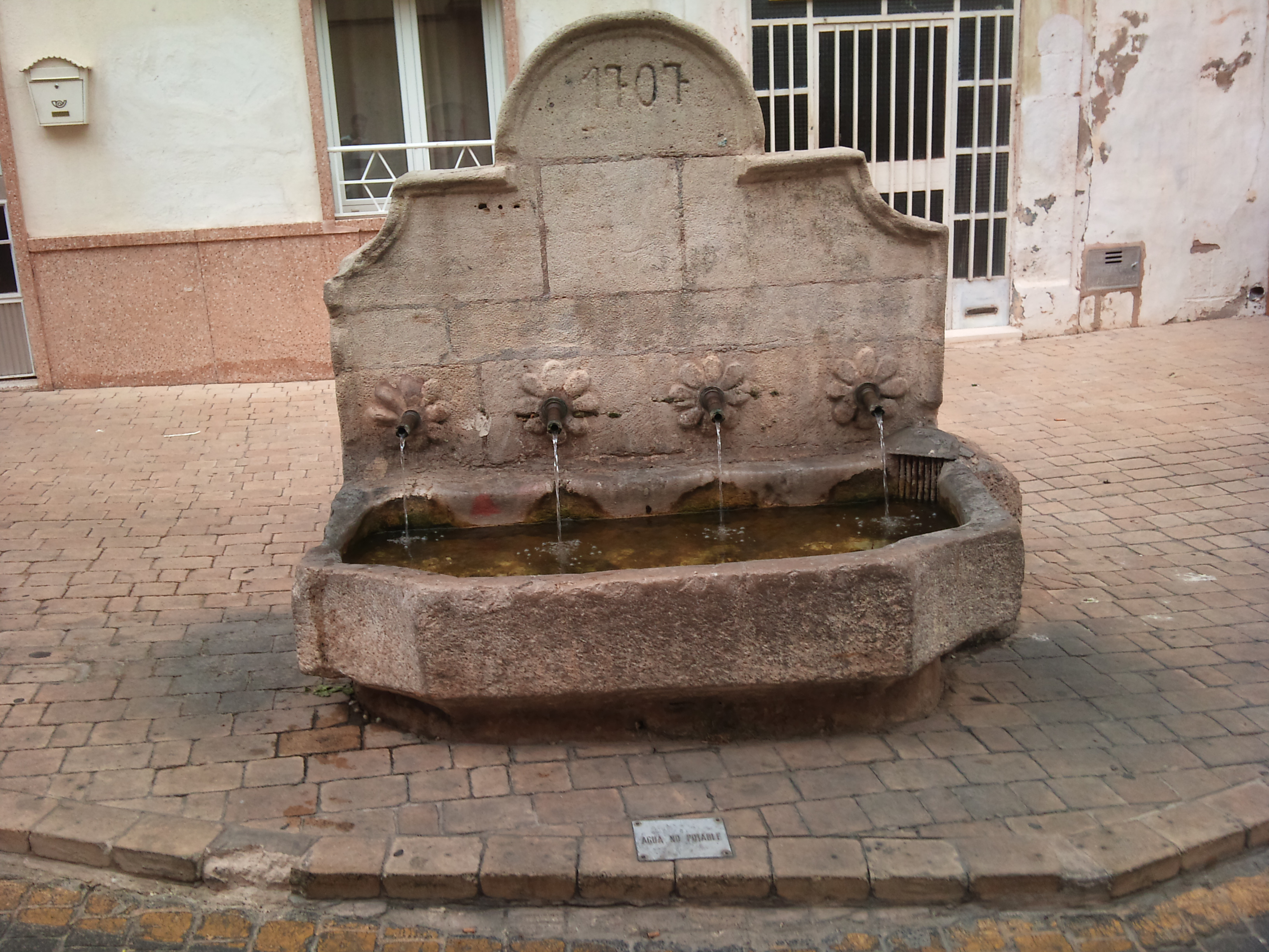 Font a Muro de l'Alcoi, El Comtat.